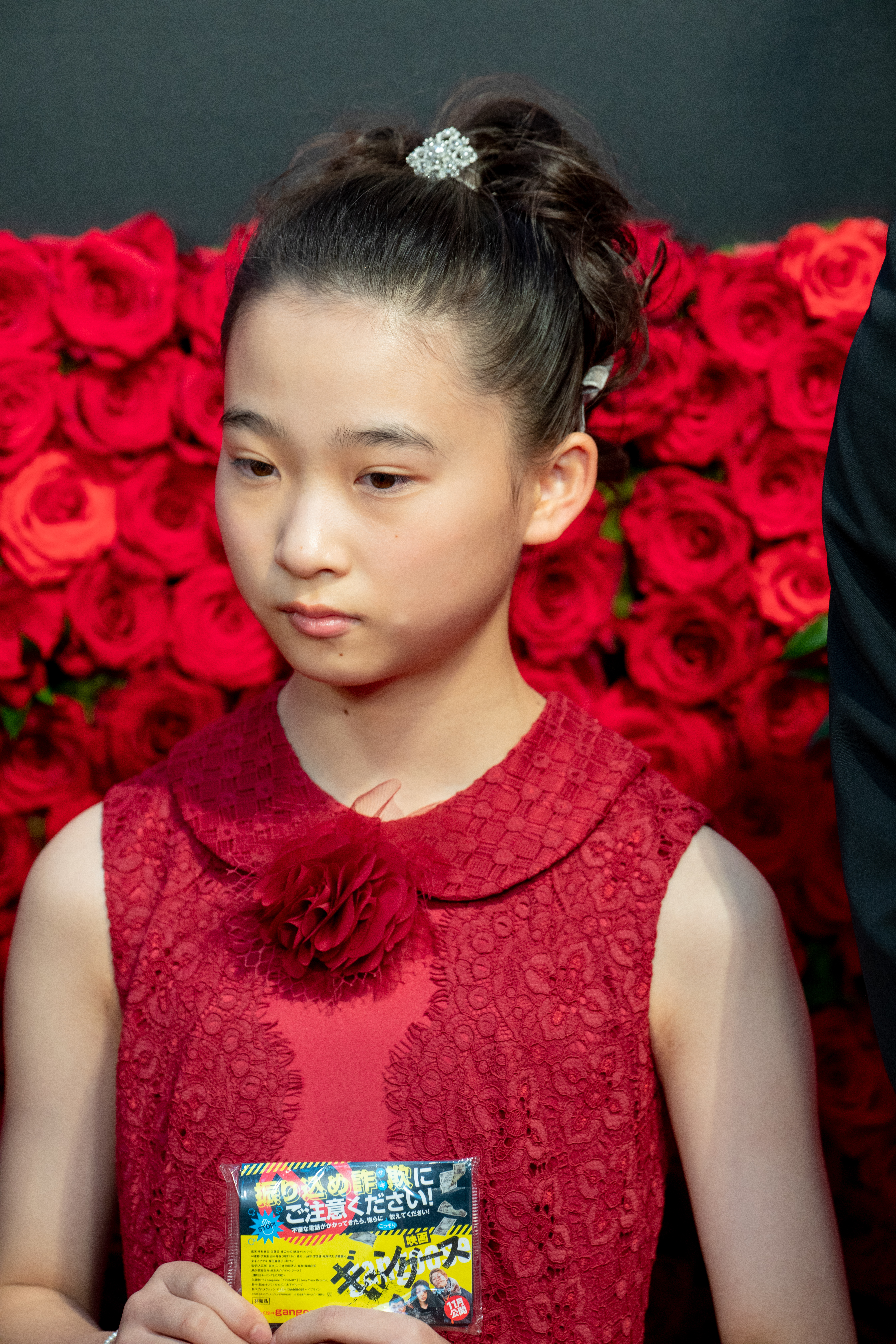 第30回 東京国際映画祭 オープニングセレモニー 伊東蒼 (ギャングース)